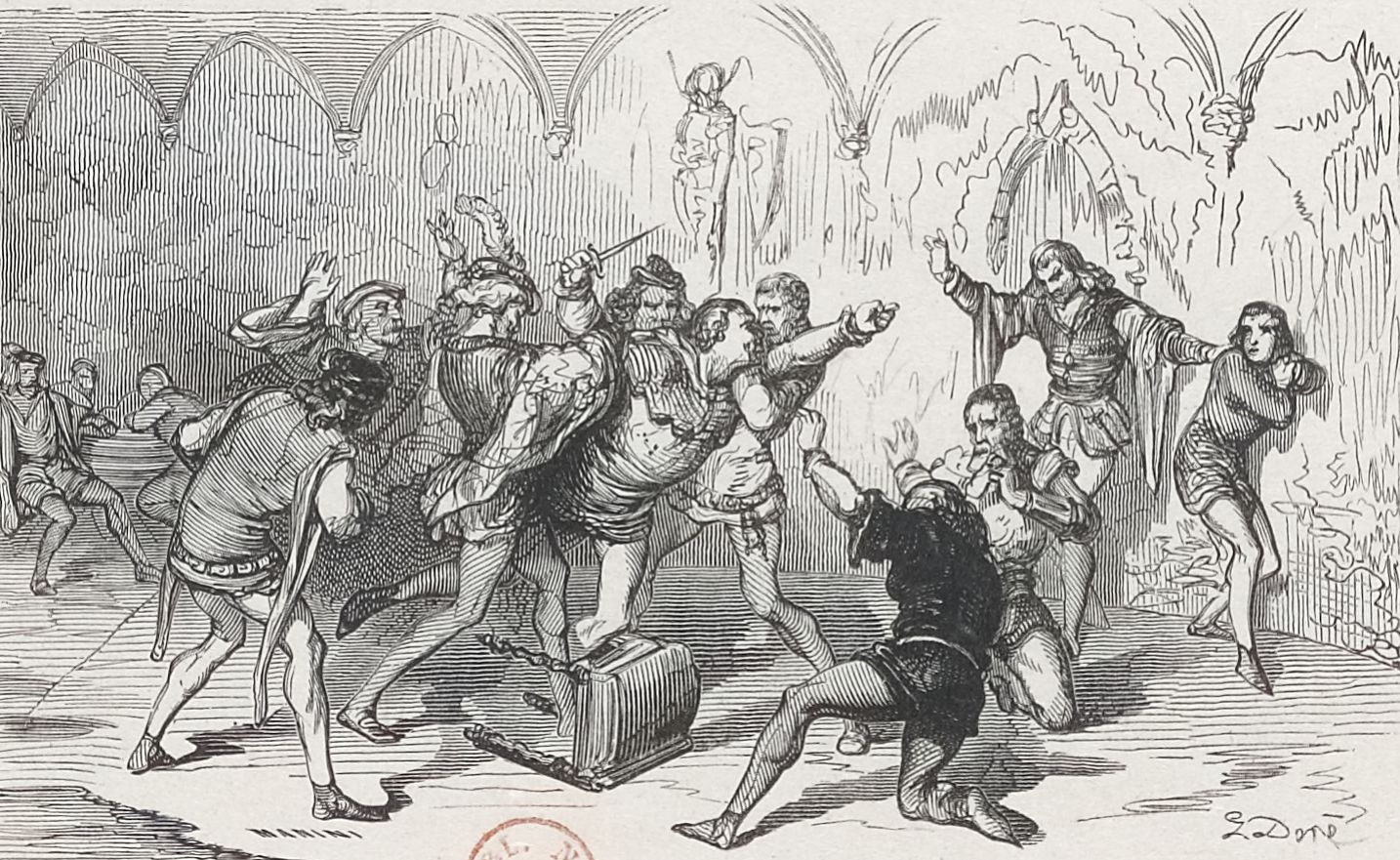 Vignette pour le Voyage aux Pyrénées d'Hippolyte Taine. Gaston Fébus, qui tente d'assassiner son fils, est arrêté par ses chevaliers et ses écuyers, Pau, musée national du Château.